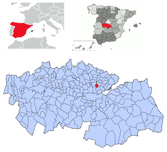 Cabañas de la Sagra en la provincia de Toledo